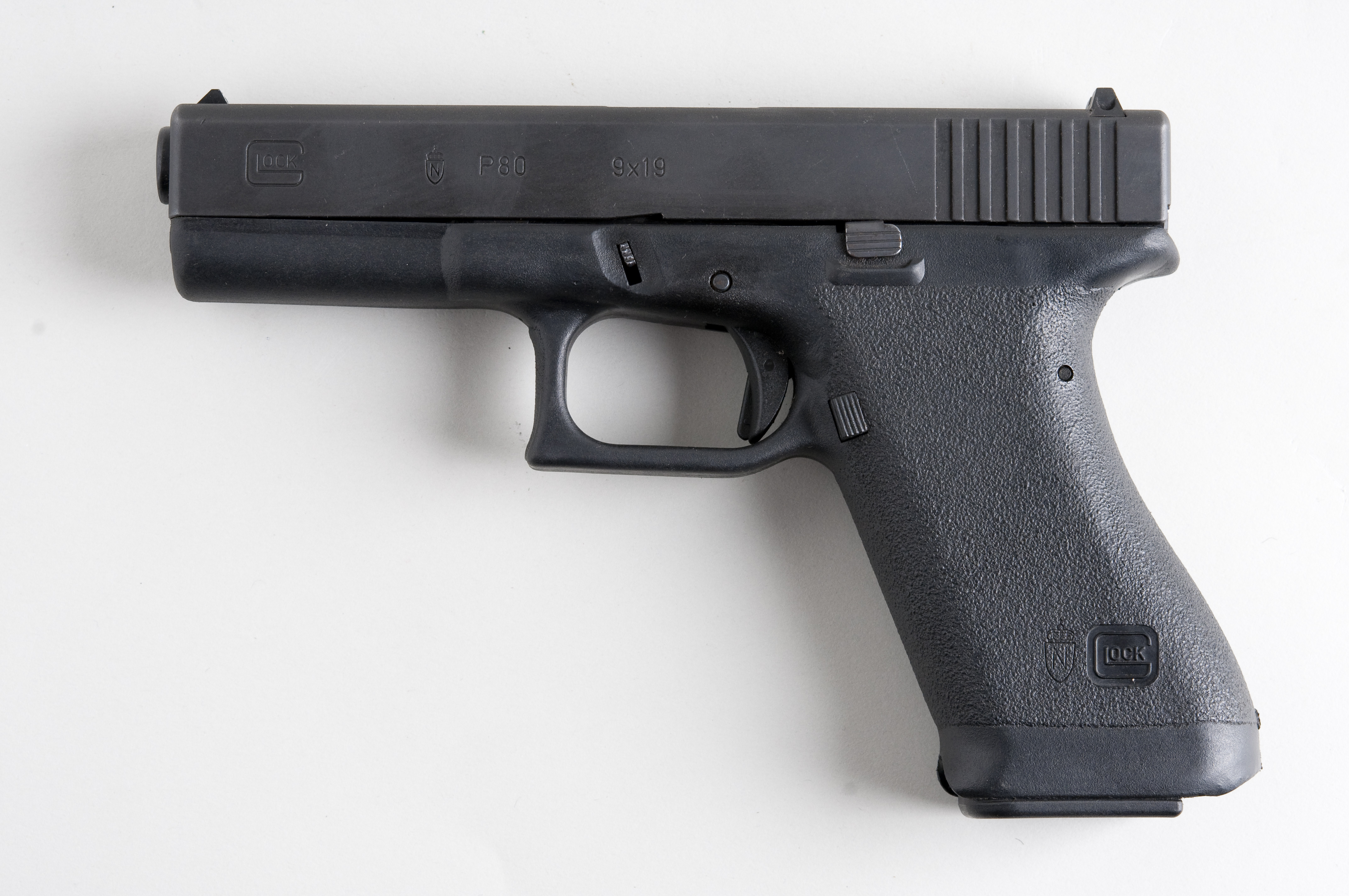 Glock 17 From flickr user handvapensamlingen - Pistols used in Norway.